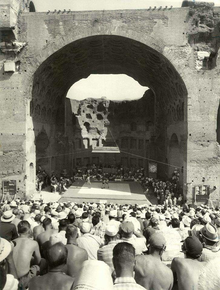 Un incontro di lotta dei Giochi olimpici di Roma 1960 disputati alla Basilica di Massenzio.